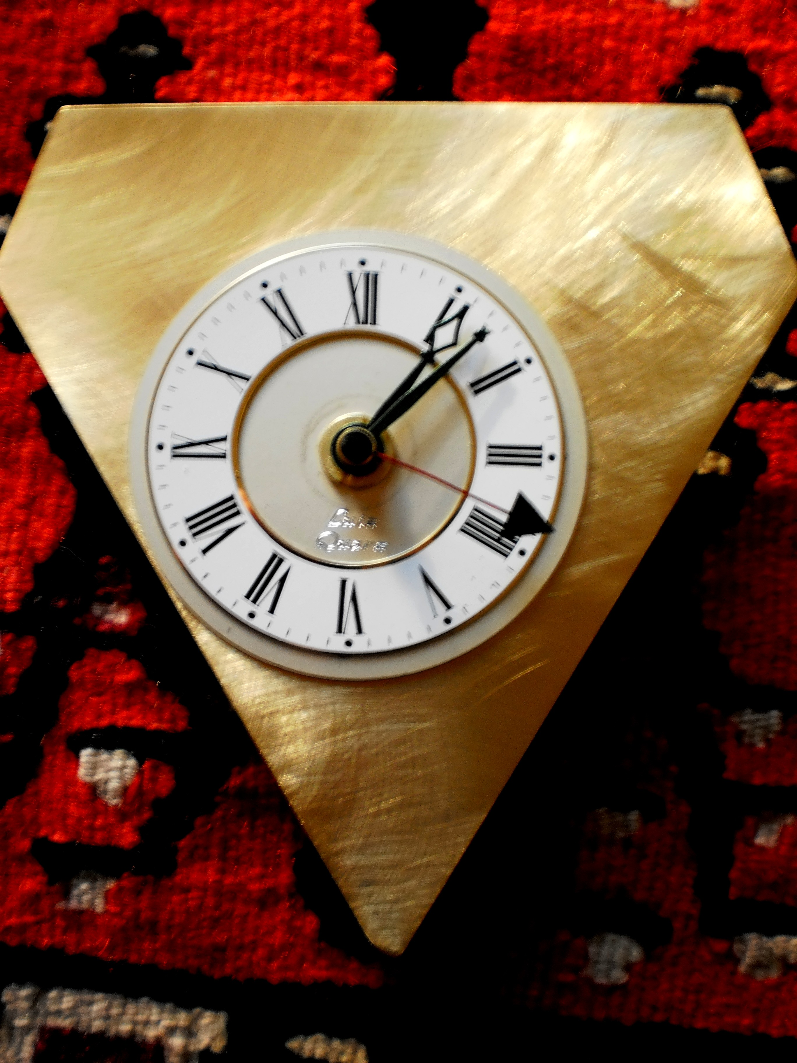 Quarzuhren - nacheigenem Entwurf und Konstuktion, Werkstoff: Messing